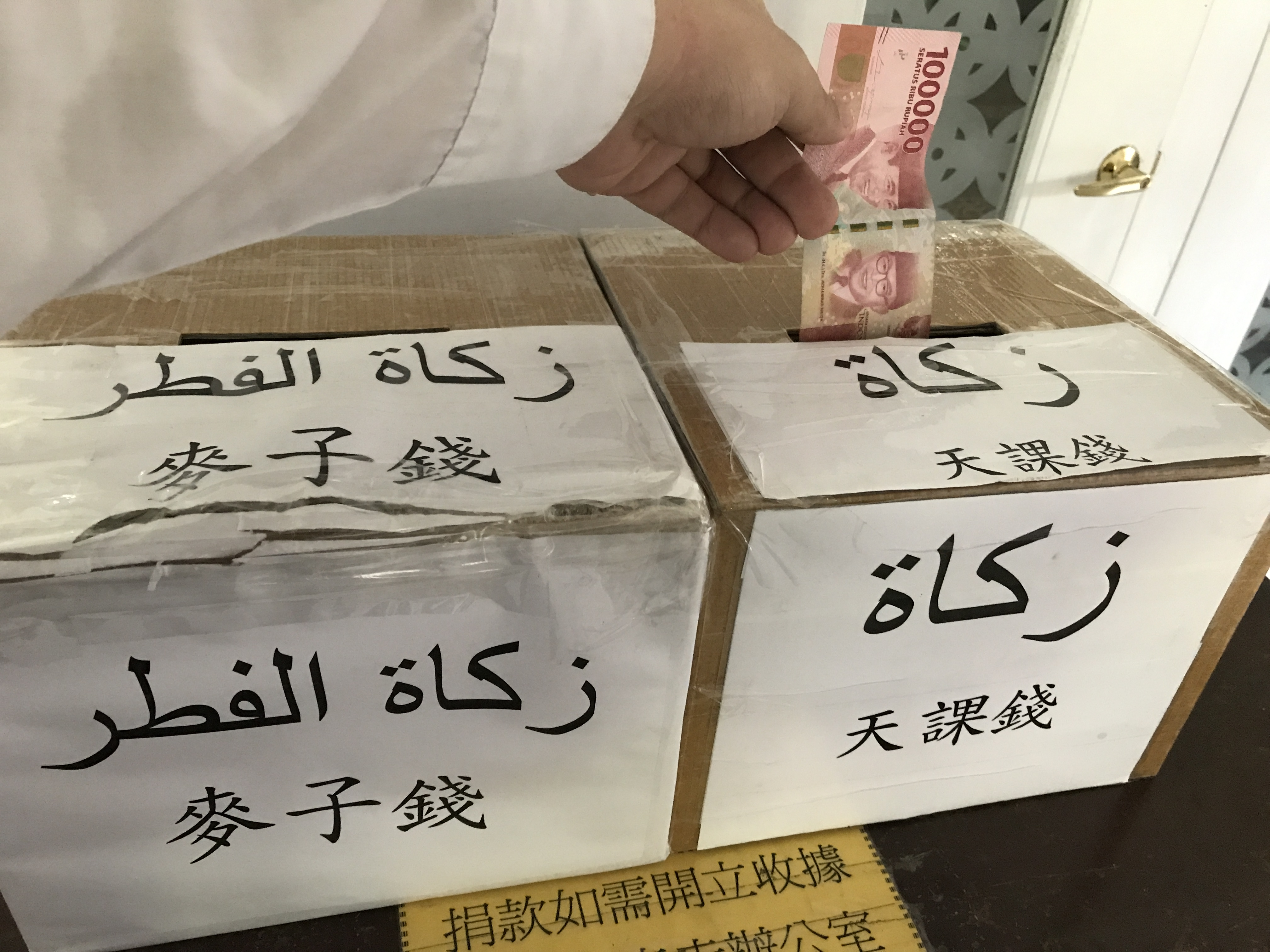 臺北清真寺內的天課錢與麥子錢募款箱，一名觀光客將手中的十萬印尼盾投入天課錢箱子。天課錢與麥子錢均為伊斯蘭教的一種募款方式，真主曾云：「你們應力行拜功，並且繳納天課。」